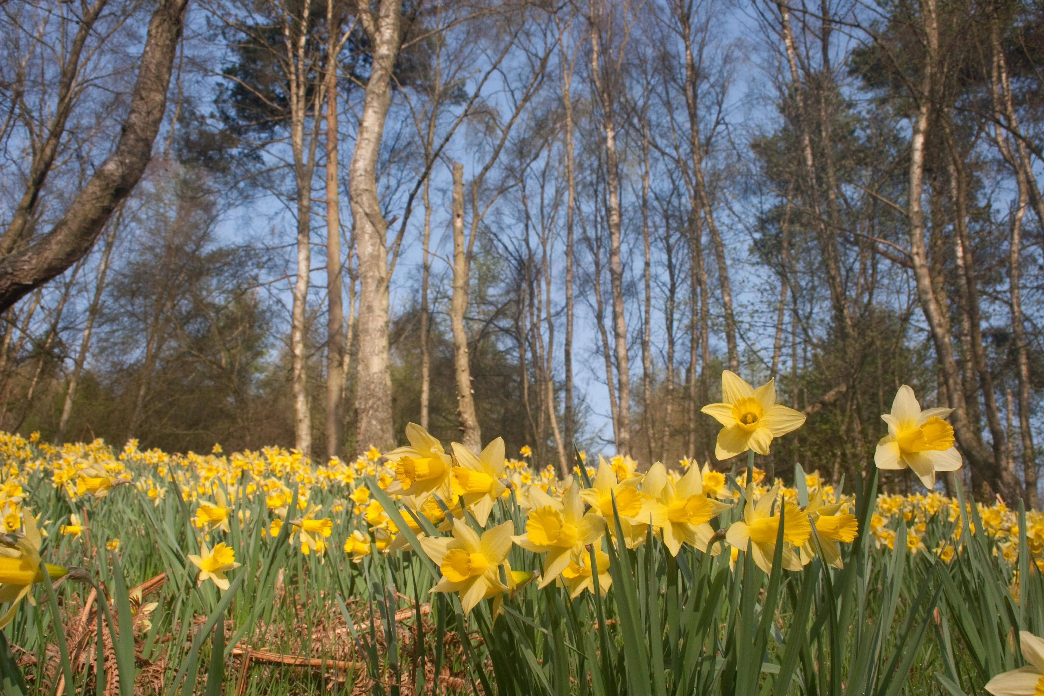 Daffodils in Farndale